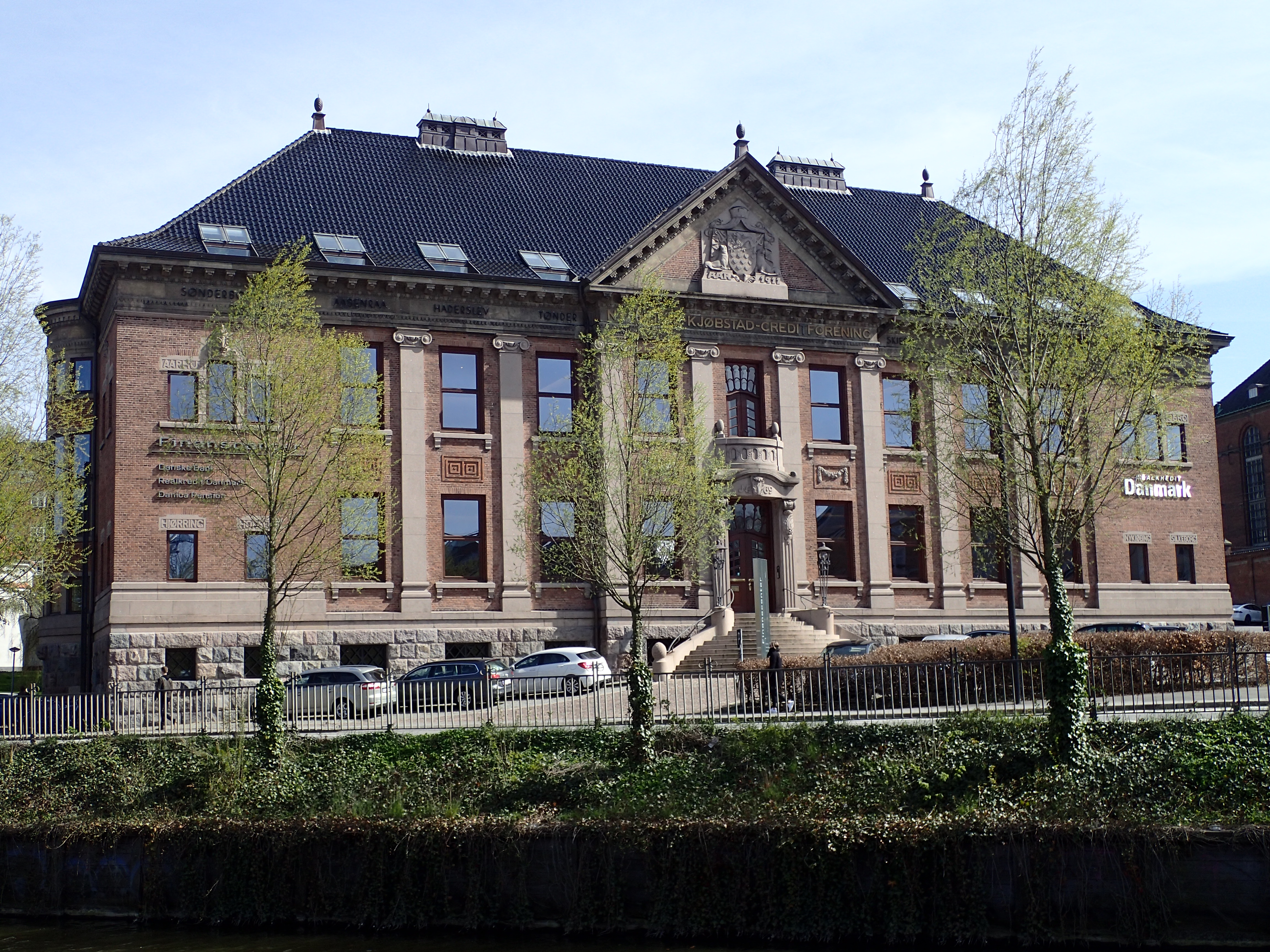 Ny jydske Kjøbstad-Creditforening, Aarhus.